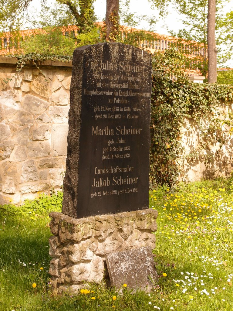 Grab des Malers Jakob Scheiner (1820-1911) auf dem Alten Friedhof in Potsdam